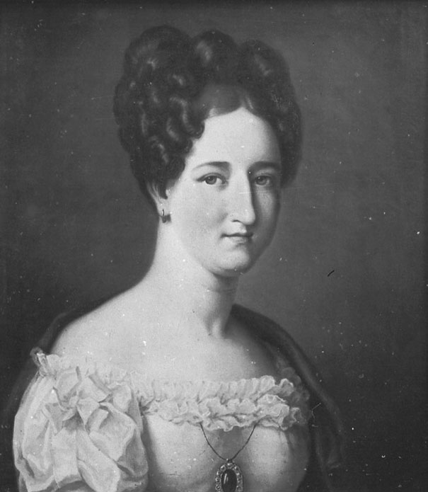 Adelheid, geborene Prinzessin von Anhalt